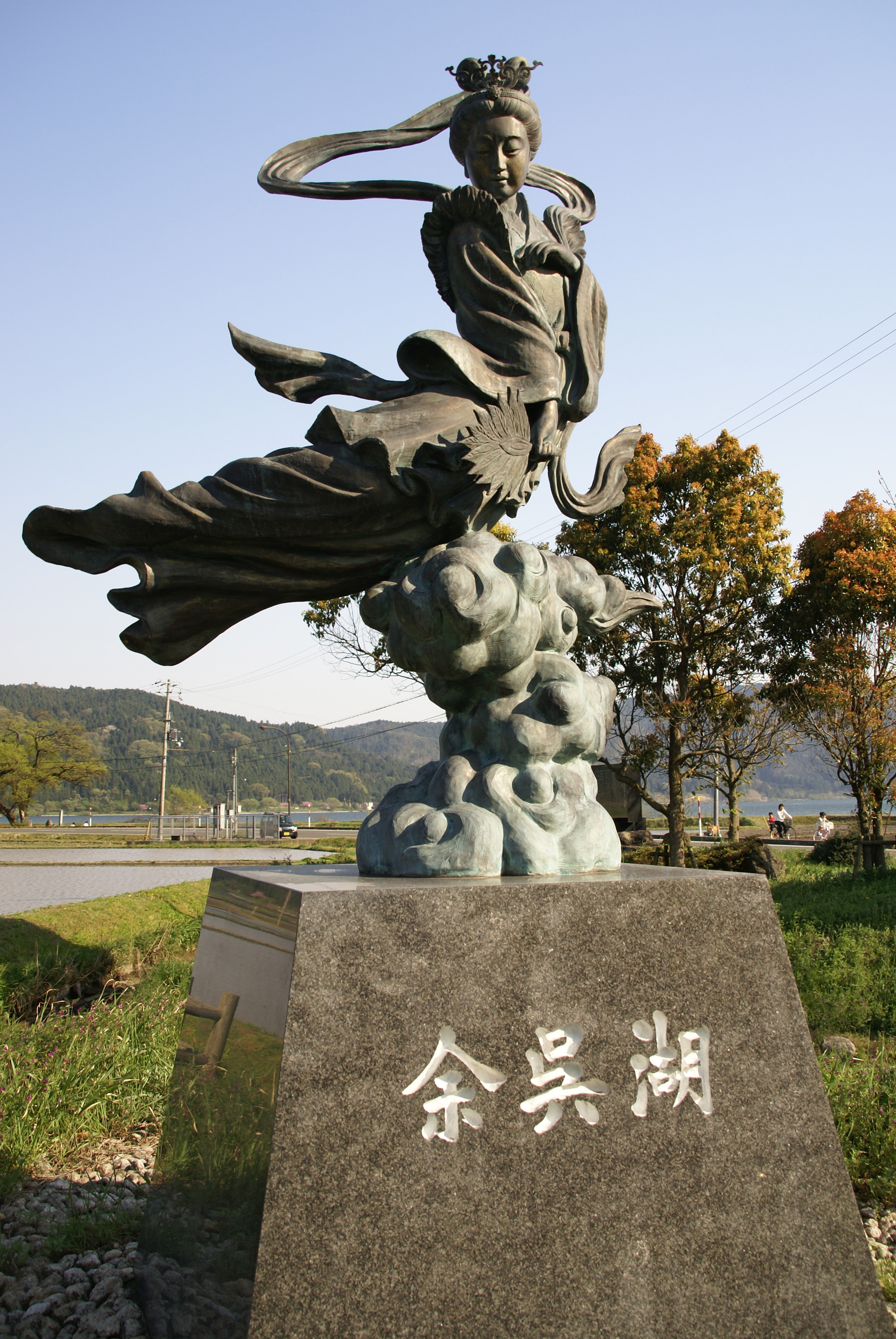 Lake Yogo in Yogo, Shiga, Japan